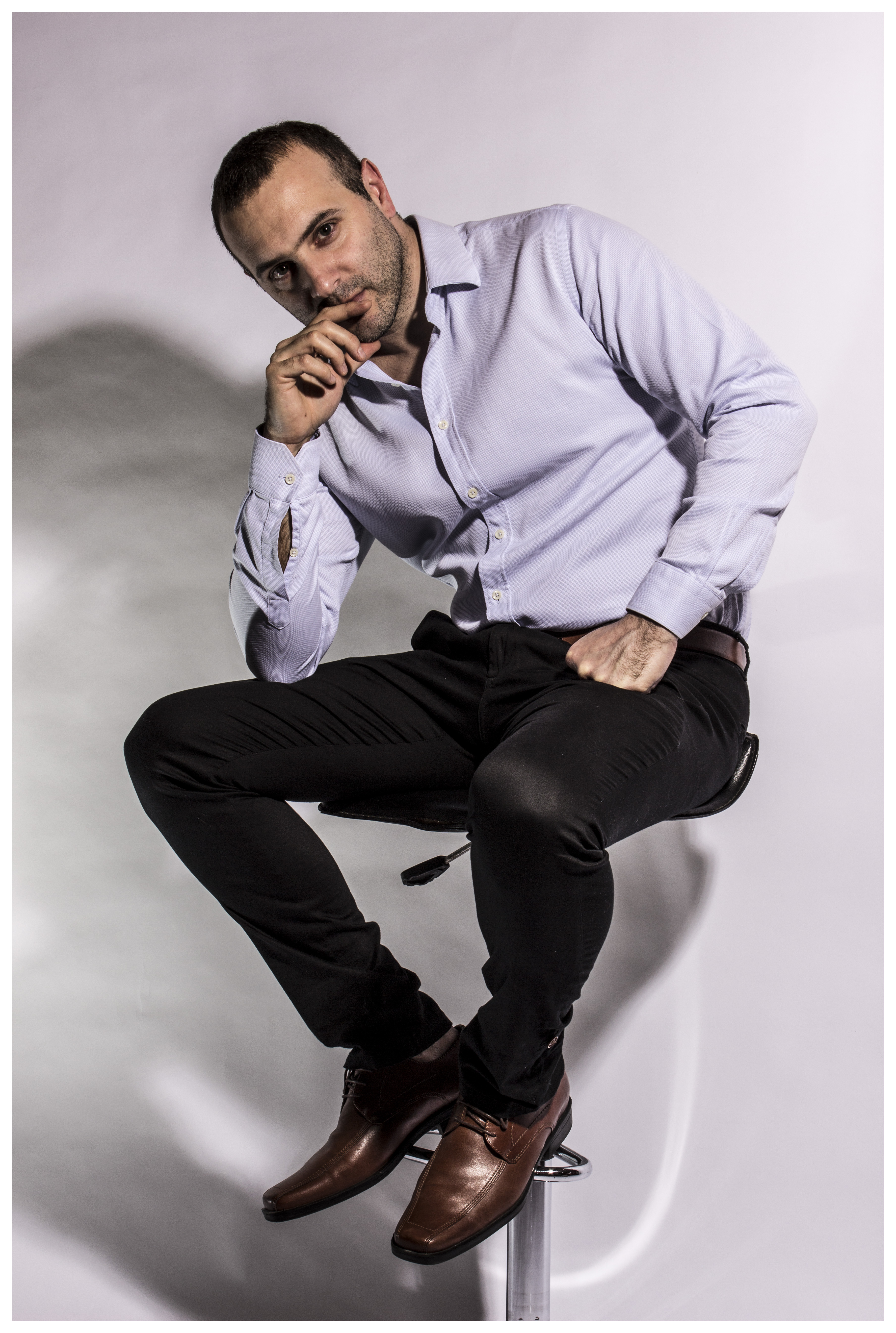 Leonardo Saggese